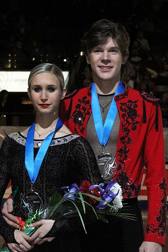 Анна Яновская и Сергей Мозгов на финале Гран-при среди юниоров сезона 2011-2012